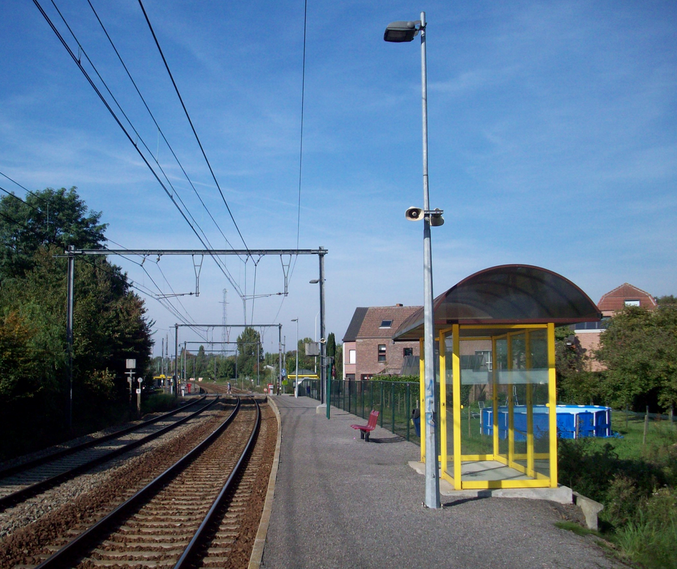 Station Schelle